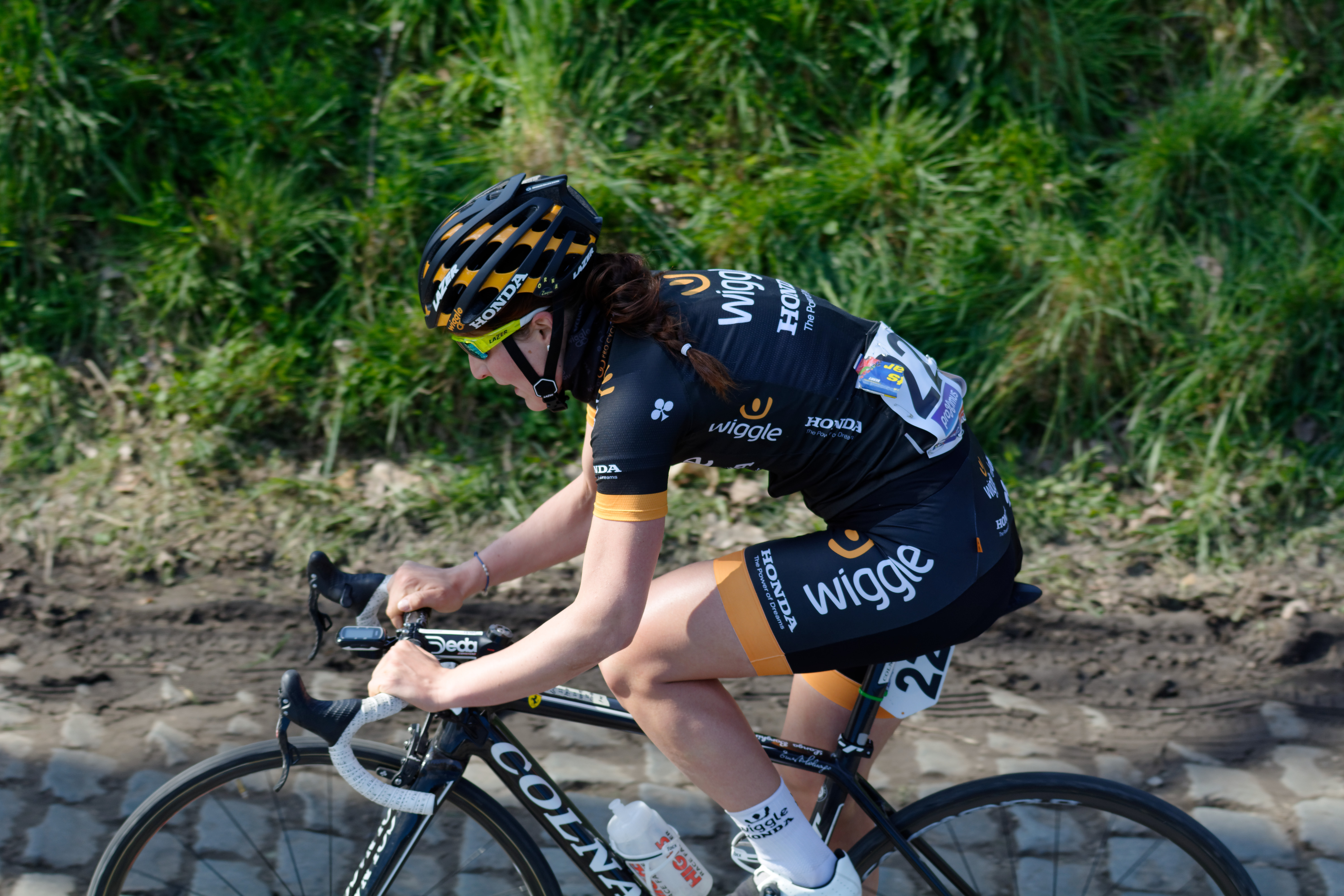 D71_6373_DxO